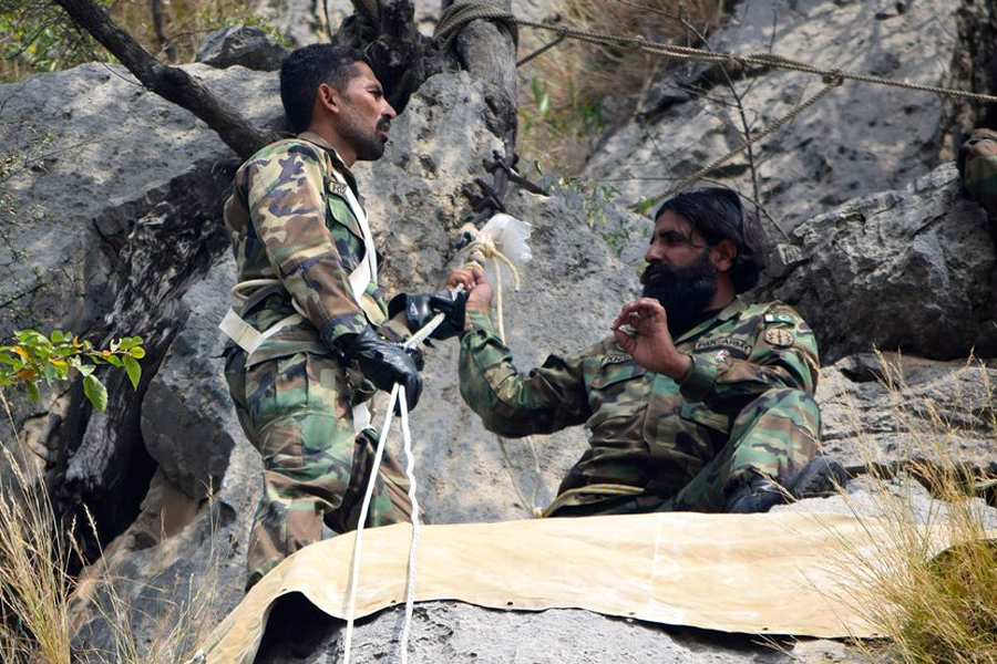 Первая совместная тренировка по горной подготовке в рамках российско-пакистанского тактического учения «Дружба-2016»